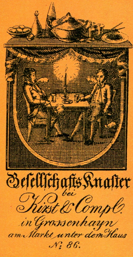 Reklame für die Tabaksorte Gesellschaftsknaster